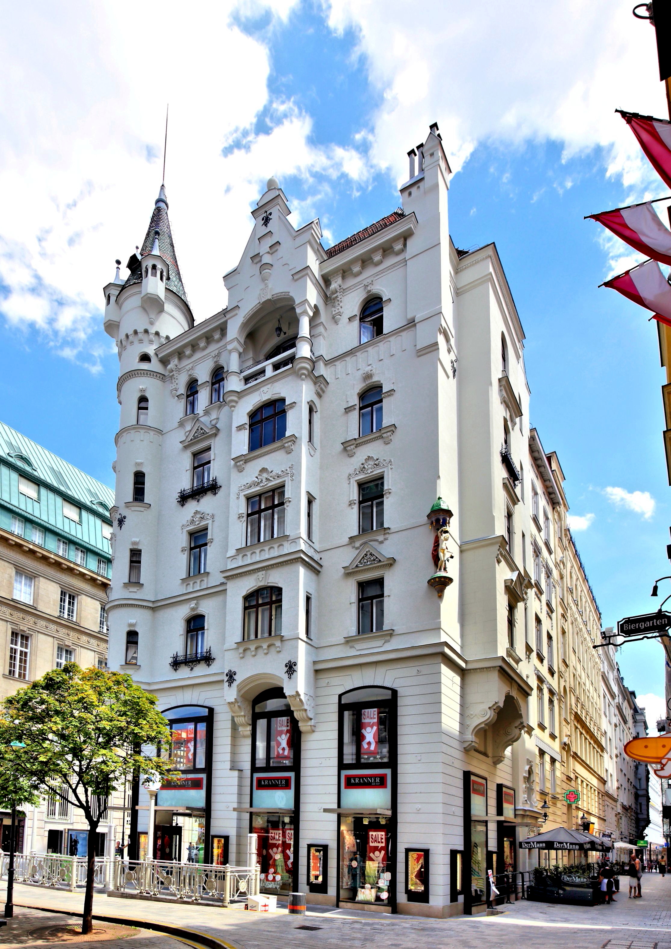 Westansicht (Standort Naglergasse/Irisgasse) des von drei Seiten freistehende Eckhauses zwischen Bognergasse, Irisgasse und Naglergasse im 1. Bezirk der österreichischen Bundeshauptstadt Wien. Das Gebäude wurde von 1901 bis 1902 nach Plänen von Emil Schnizer errichtet. Links unten im Bild die Abgänge zur öffentlichen Bedürfnisanstalt in der Irisgasse.